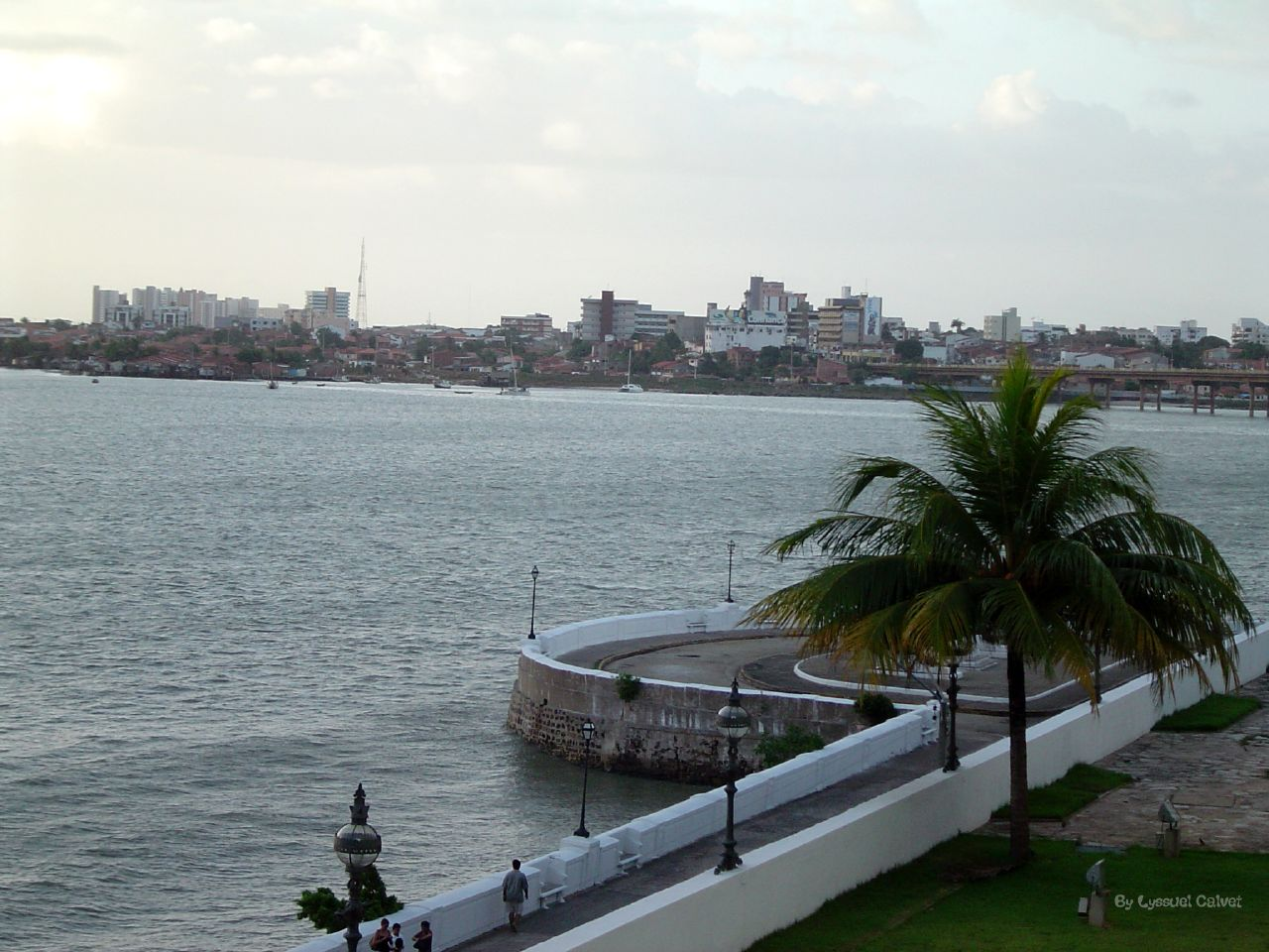 Lateral do Acesso ao PALÁCIO DOS LEÕES 2